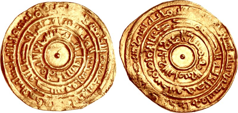 Dinar do califa fatímida Almuiz cunhado em 969/970.